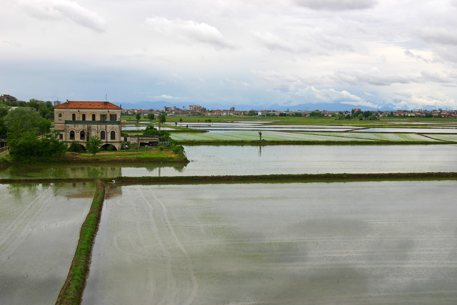 Scenario delle risaie nei pressi di Novara, durante il mese di Maggio